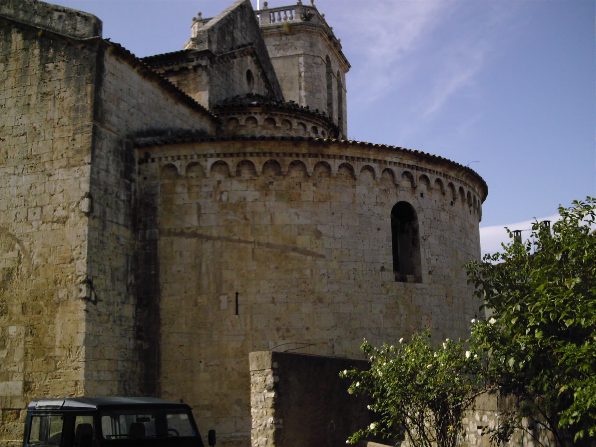 església st Pere de Besalú